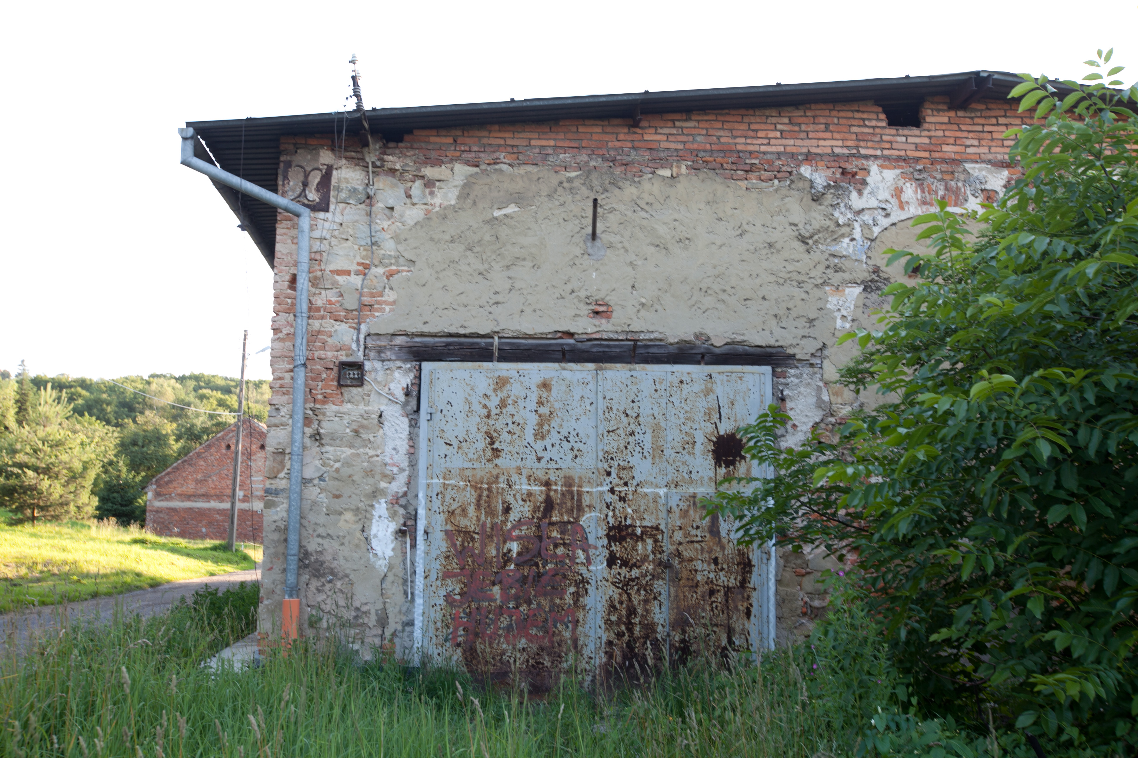 Stara Synagoga w Wieliczce, ul. Wiejska 11, dzielnica Klasno, ściana północna